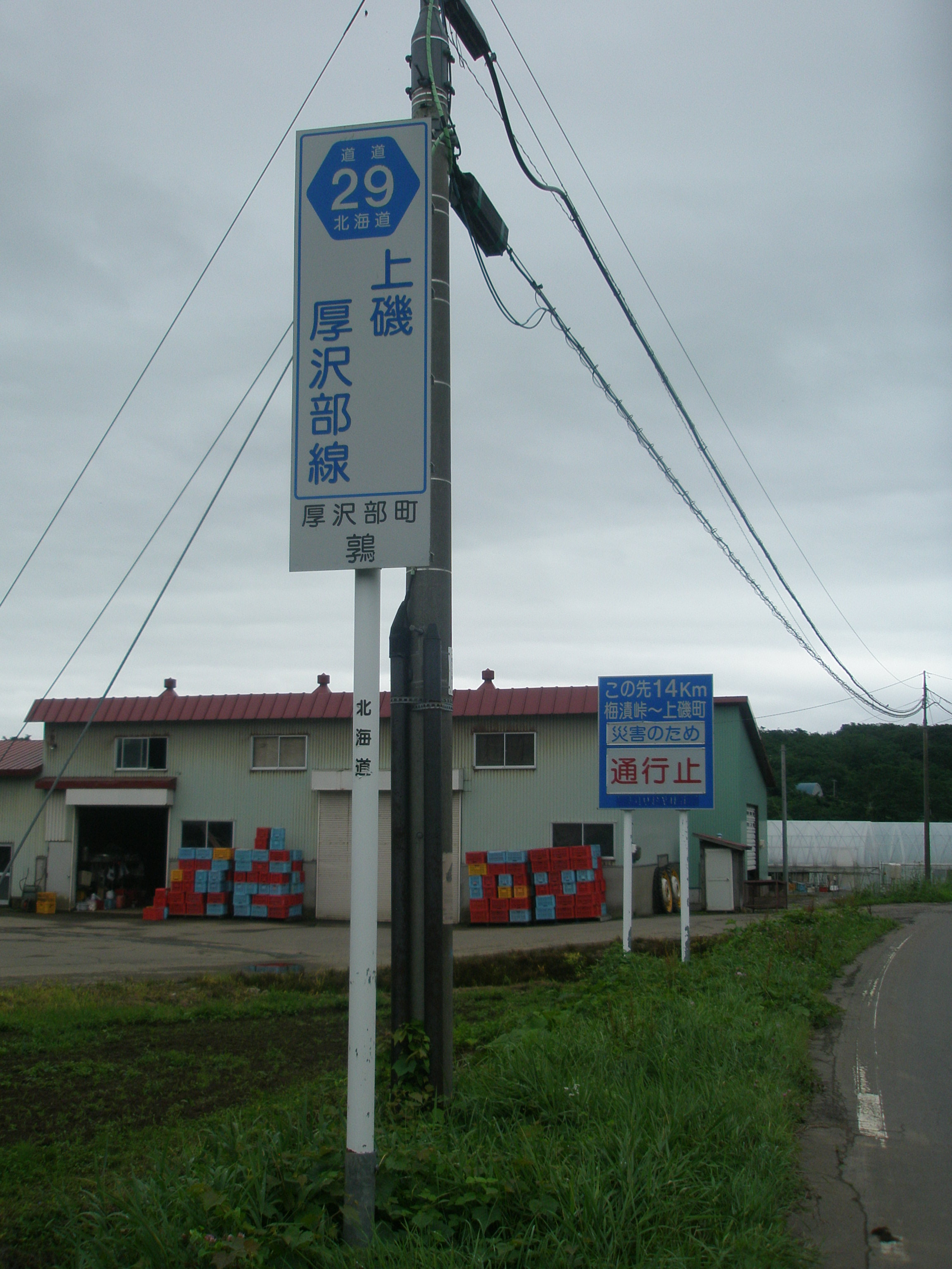 北海道道29号上磯厚沢部線・道道番号及び路線名の標識と道路情報板（2018年8月撮影、終点付近の物）